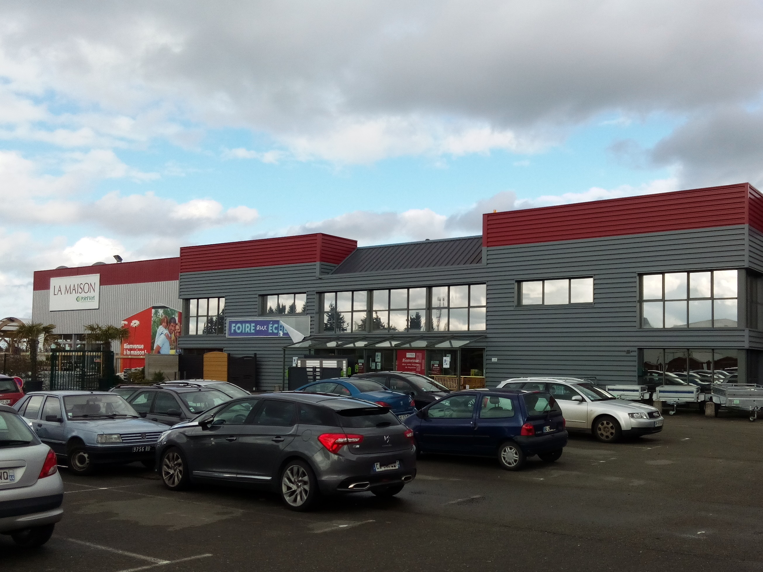 Magasin LA MAISON Point Vert de Mayenne Coopérative Agrial